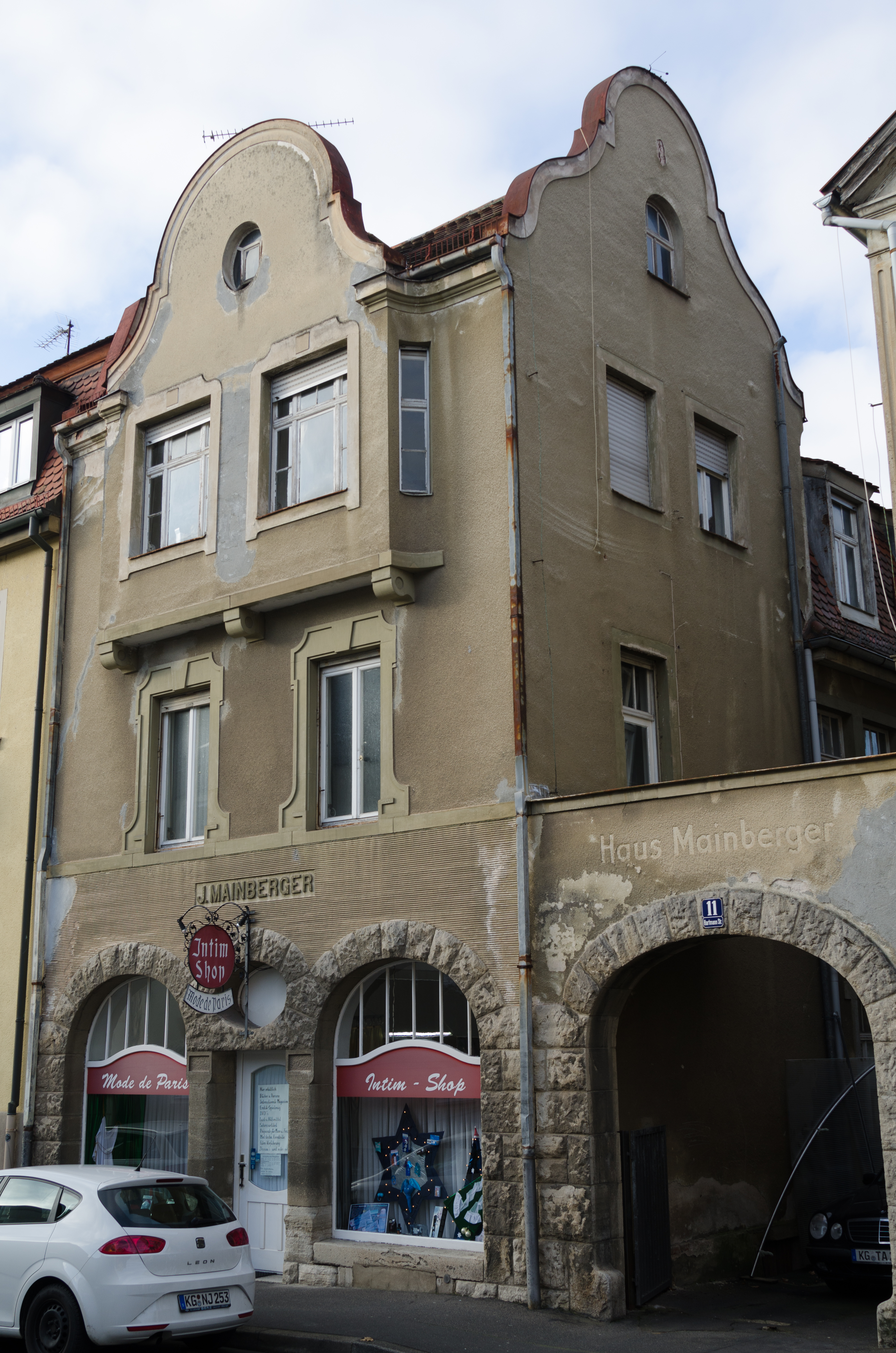 Bad Kissingen, Hartmannstraße 11, Ladengebäude